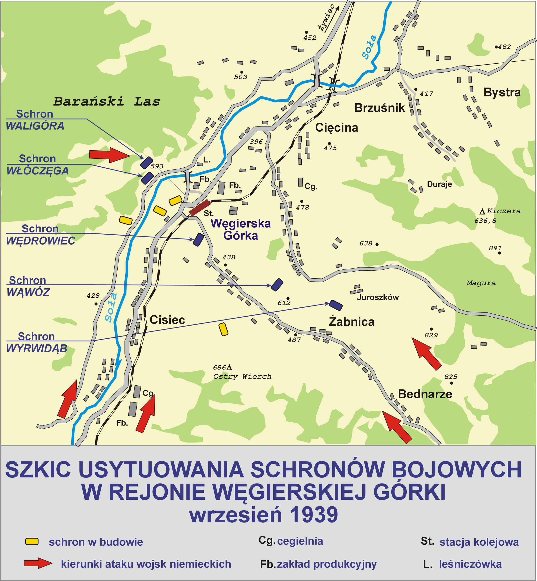 Szkic usytuowania schronów bojowych w rejonie Węgierskiej Górki (wrzesień 1939)